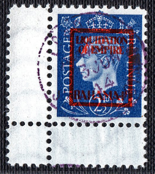 Deutsche Propagandabriefmarke von 1944, hergestellt im KZ Oranienburg-Sachsenhausen mit Propagandastempel. Die wichtigsten Unterschiede zur britischen Freimarkenserie Mi. Nr. 221-226 sind: Hammer und Sichel in der Rose links. Davidstern statt Kreuz auf Krone. Davidstern in Distel rechts. Pennyzeichen aus Hammer und Sichel gebildet. Abweichende Zähnung. Die Marke trägt einen Propagandaaufdruck: "LIQUIDATION OF EMPIRE/BAHAMA-IS" sowie einen violetten Propagandastempel: "LONDON AAAO/-6JUN/44/SPECIAL-STAMP". Die Auflage des vollständigen Satzes (6 Werte) wird mit 400 angegeben.